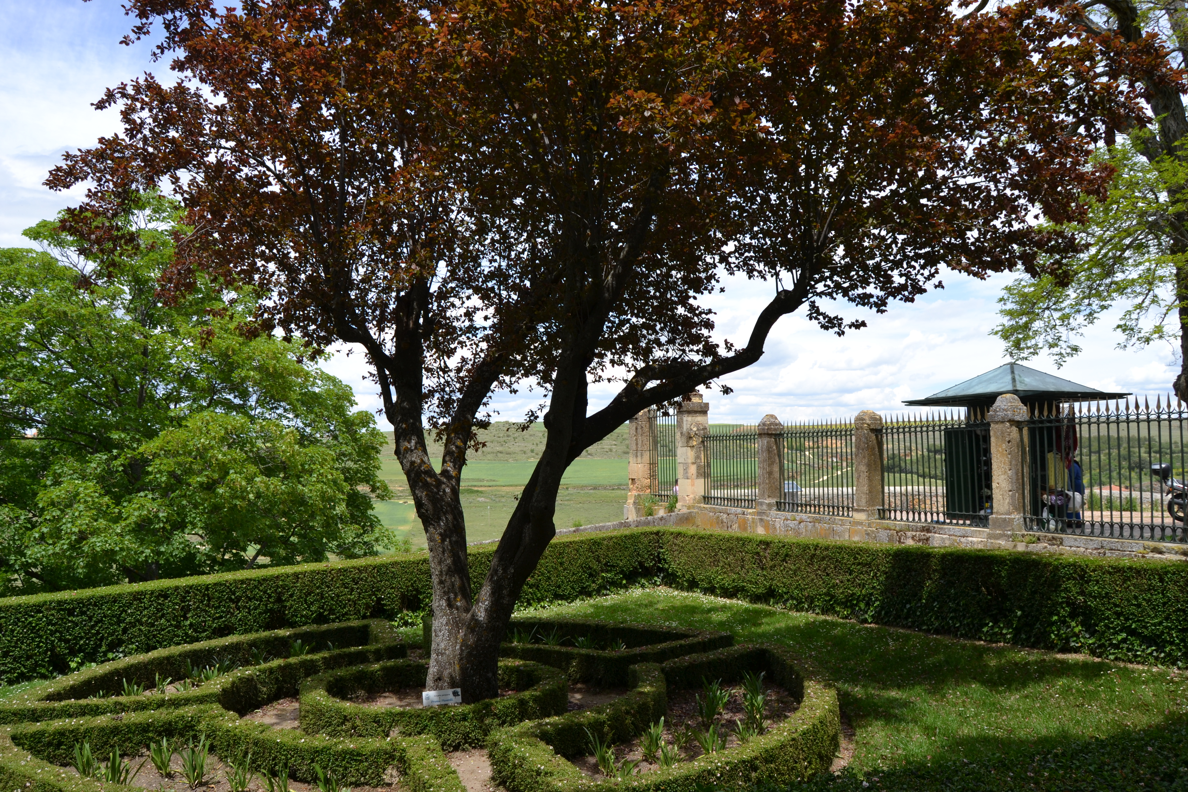 Segovia, Castilla y León, España. Mayo de 2016.